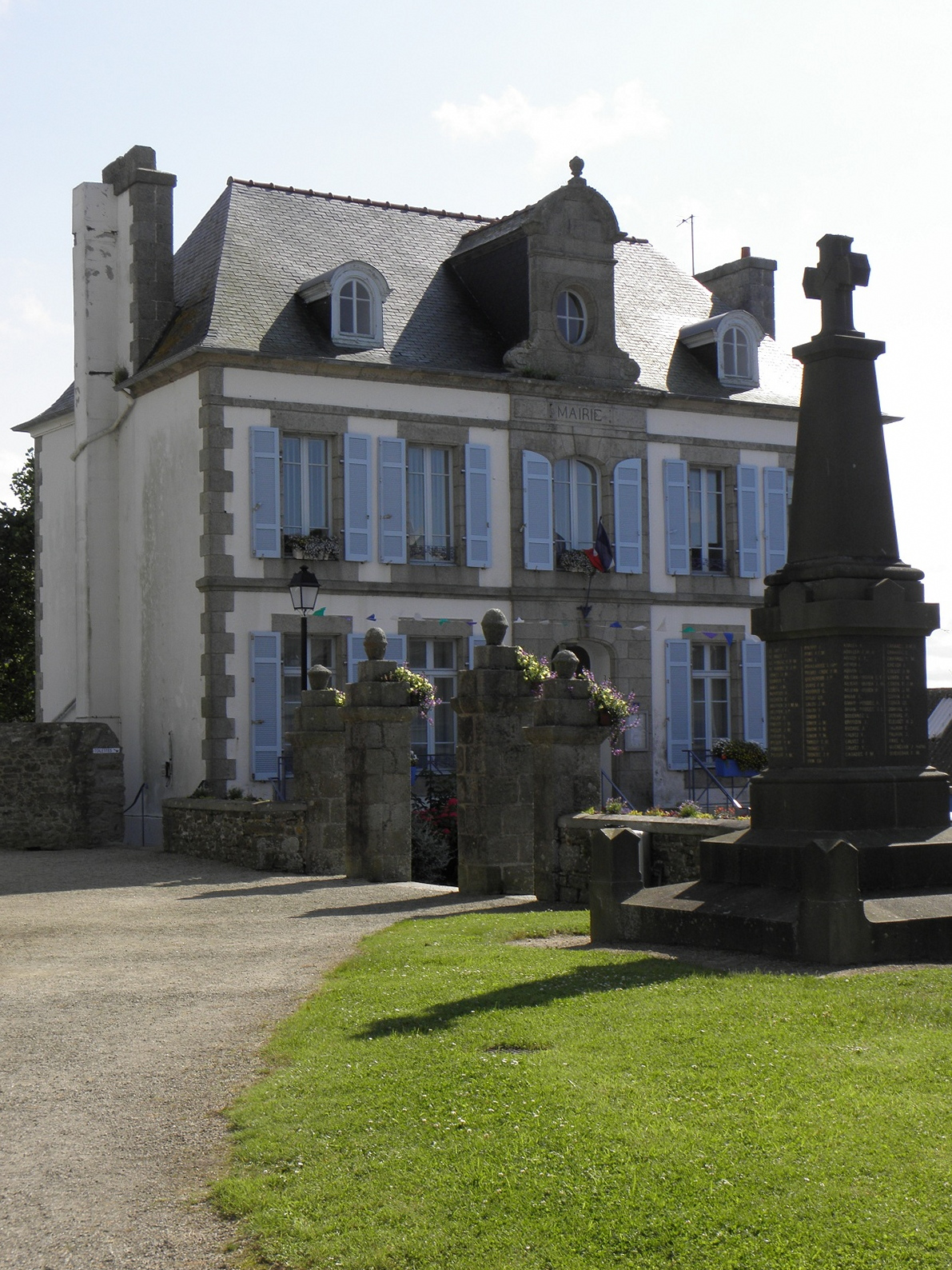 Mairie de Plounéour-Trez (29).